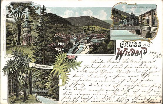 Ansichtskarte aus Bad Wildbad